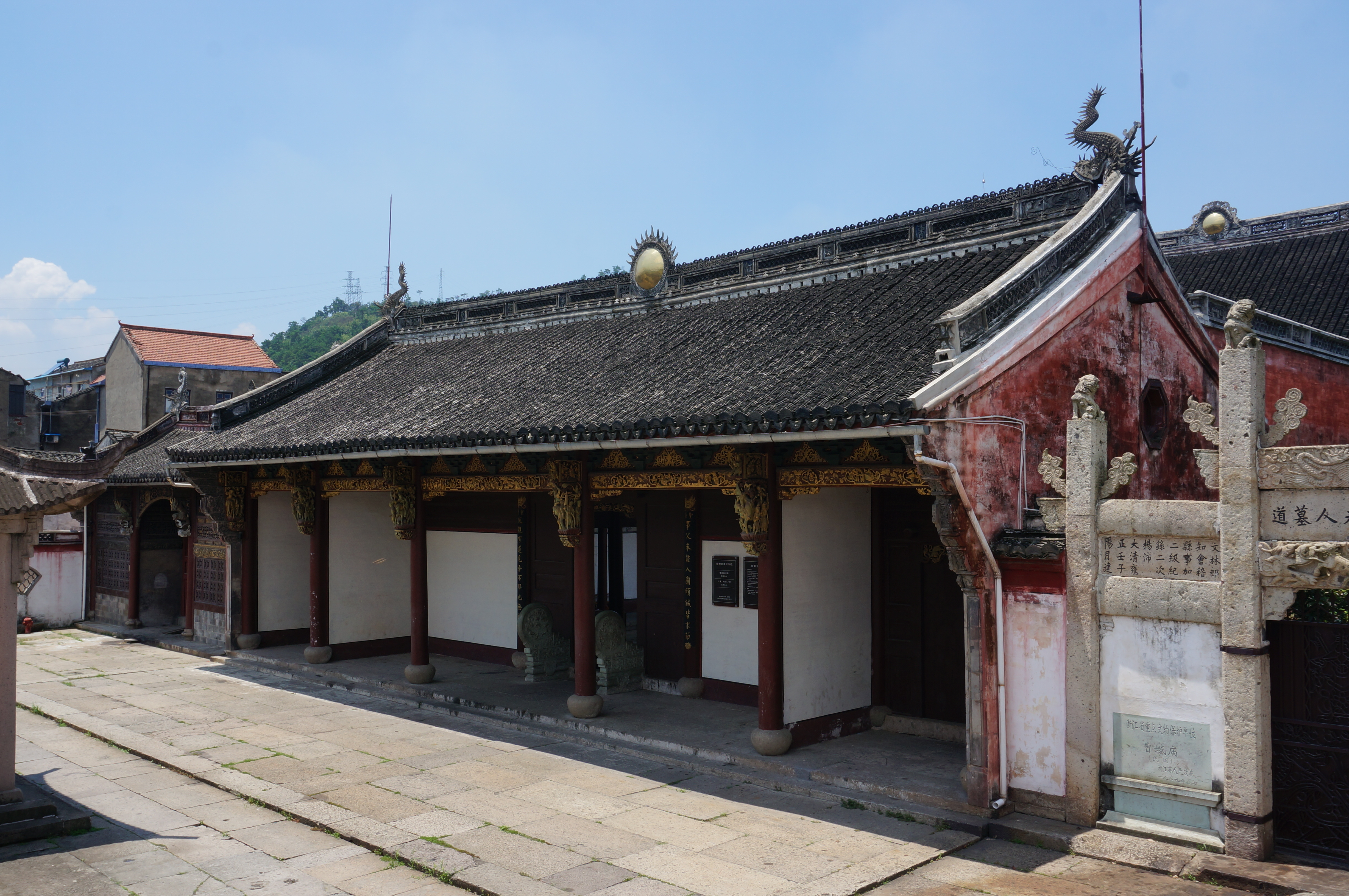 曹娥庙，大山门，自东北看。